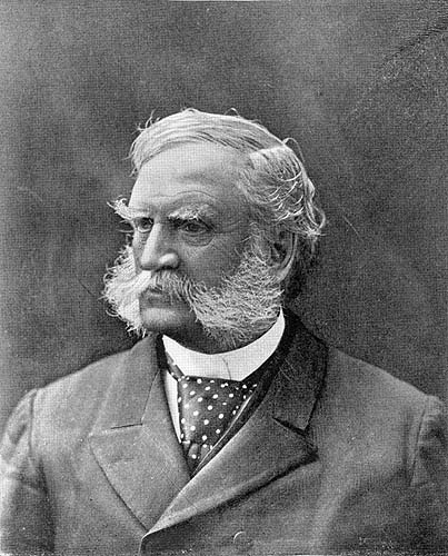 George W. Morgan